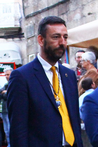 Procesión de San Telmo. Tui (Galicia, España), 29 de abril de 2019.